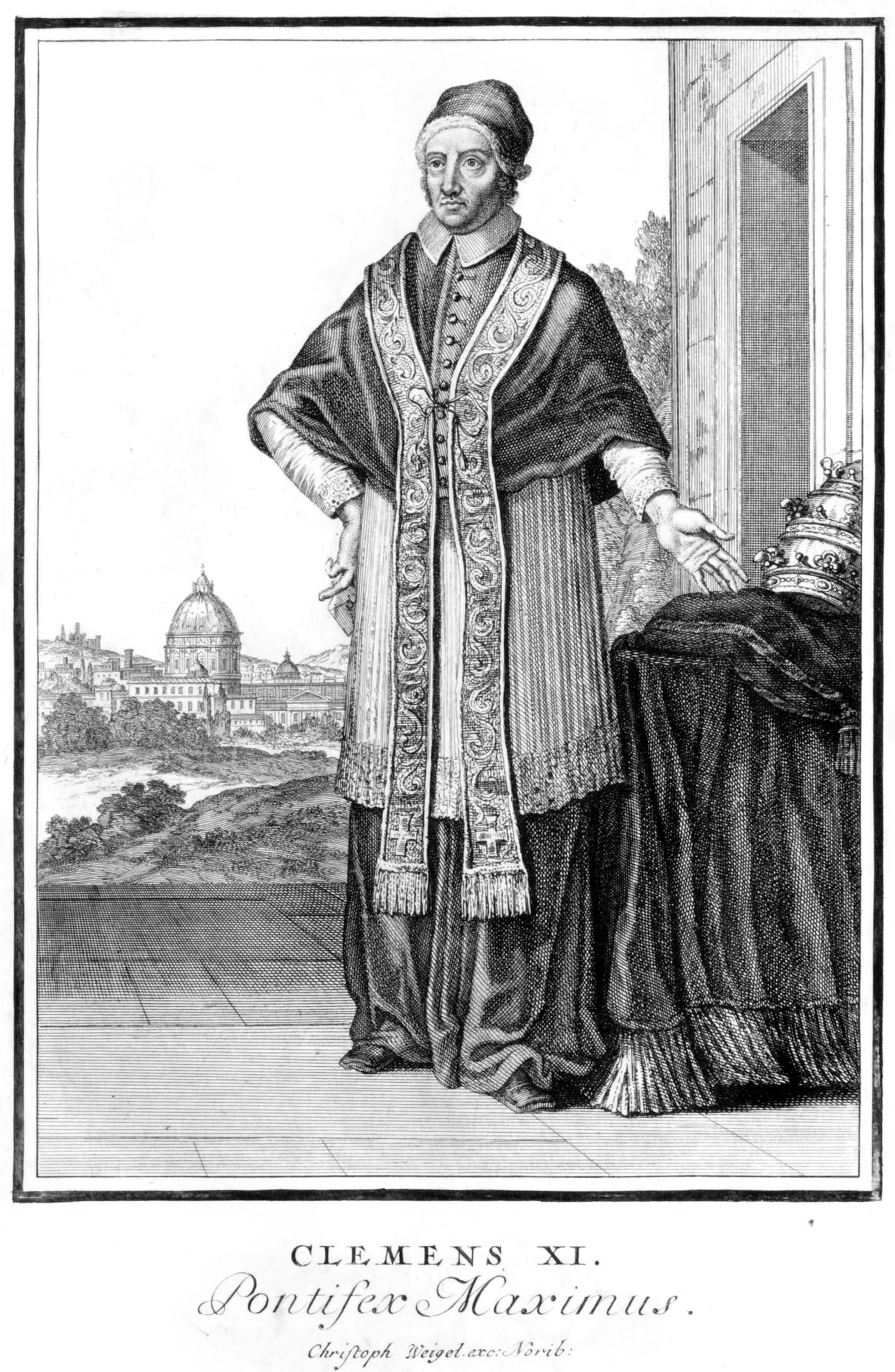 Neu-eröffnete Welt-Galleria. ..., Nürnberg 1703. 1. Clemens XI. Pontifex Maximus.